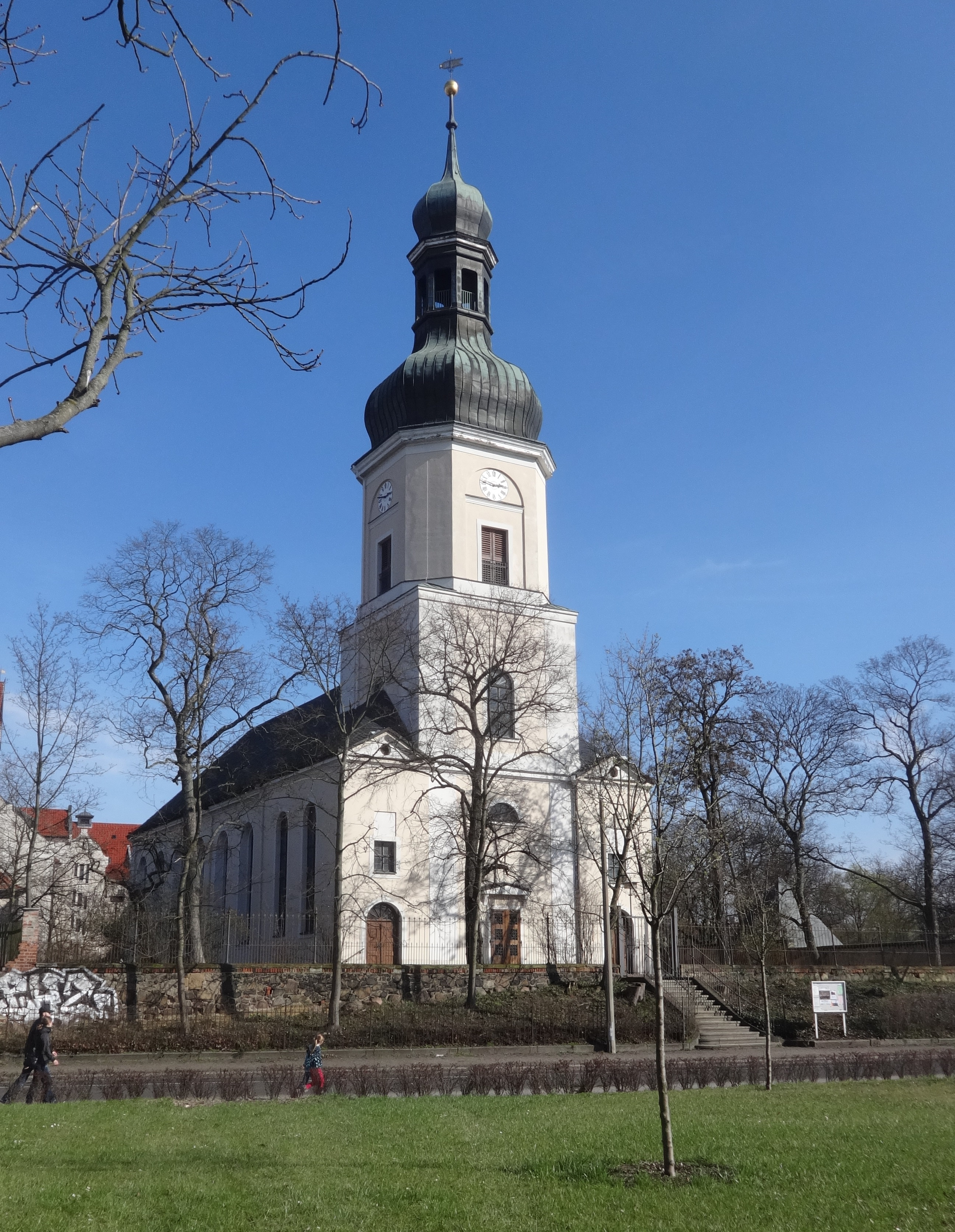 Gedächtniskirche in Leipzig-Schönefeld (25.03.2017)